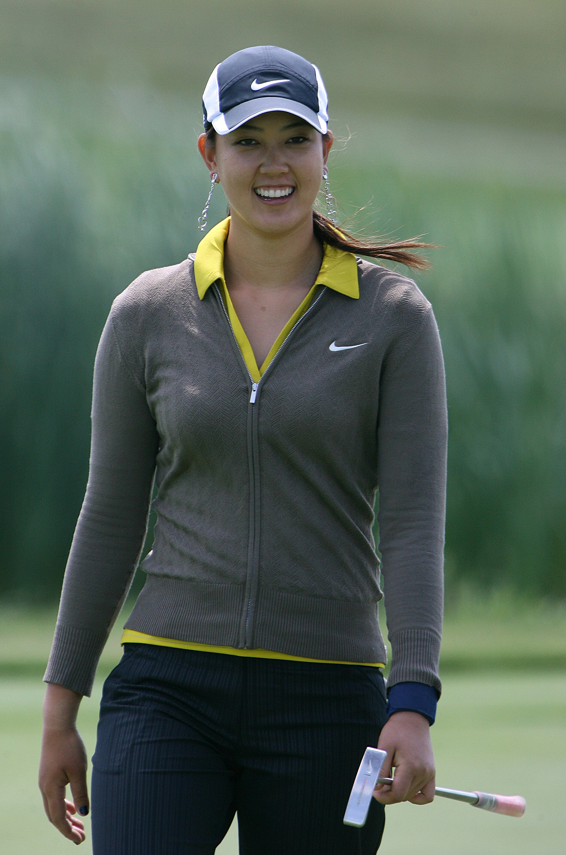 Michelle Wie